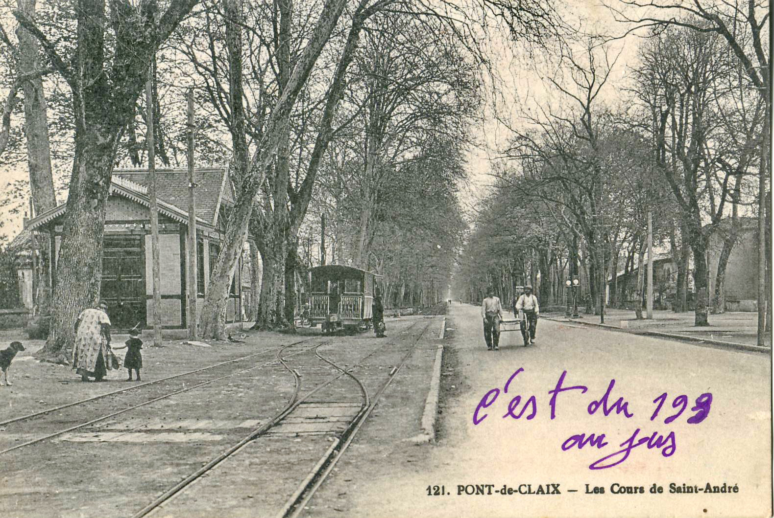 Carte postale ancienne éditée par Maringard, n°121 : PONT-DE-CLAIX - Les cours de Saint-André. Vue de la station de la SGTE de l'ancien tramway de Grenoble